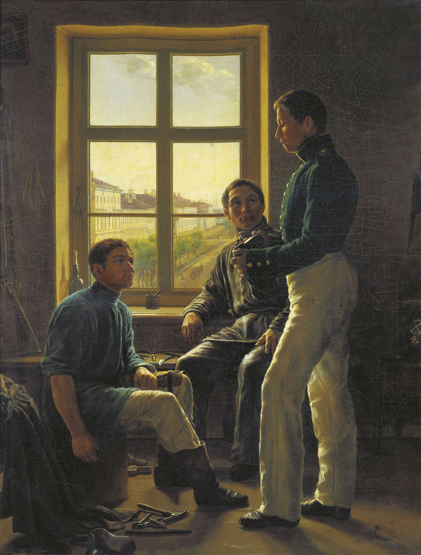 Матросы в сапожной мастерской. Изображены матросы в сапожной мастерской на фоне яркого окна.